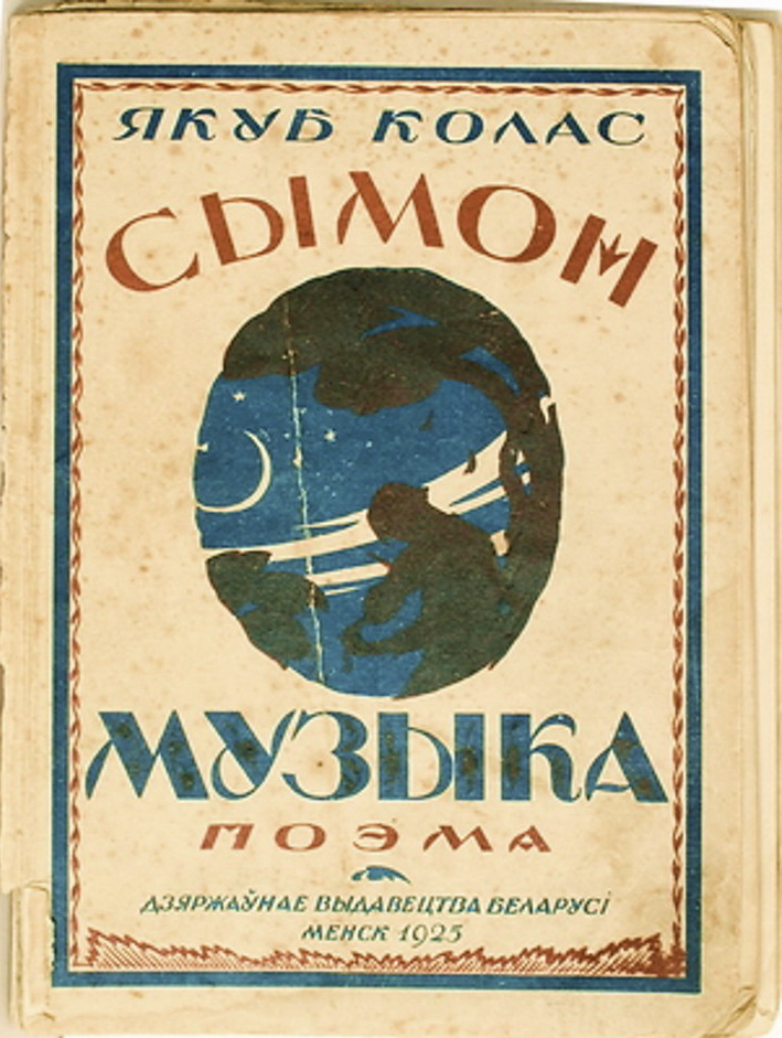 "Сымон-музыка". Паэма. Менск: Дзяржаўнае выдавецтва Беларусі, 1925.